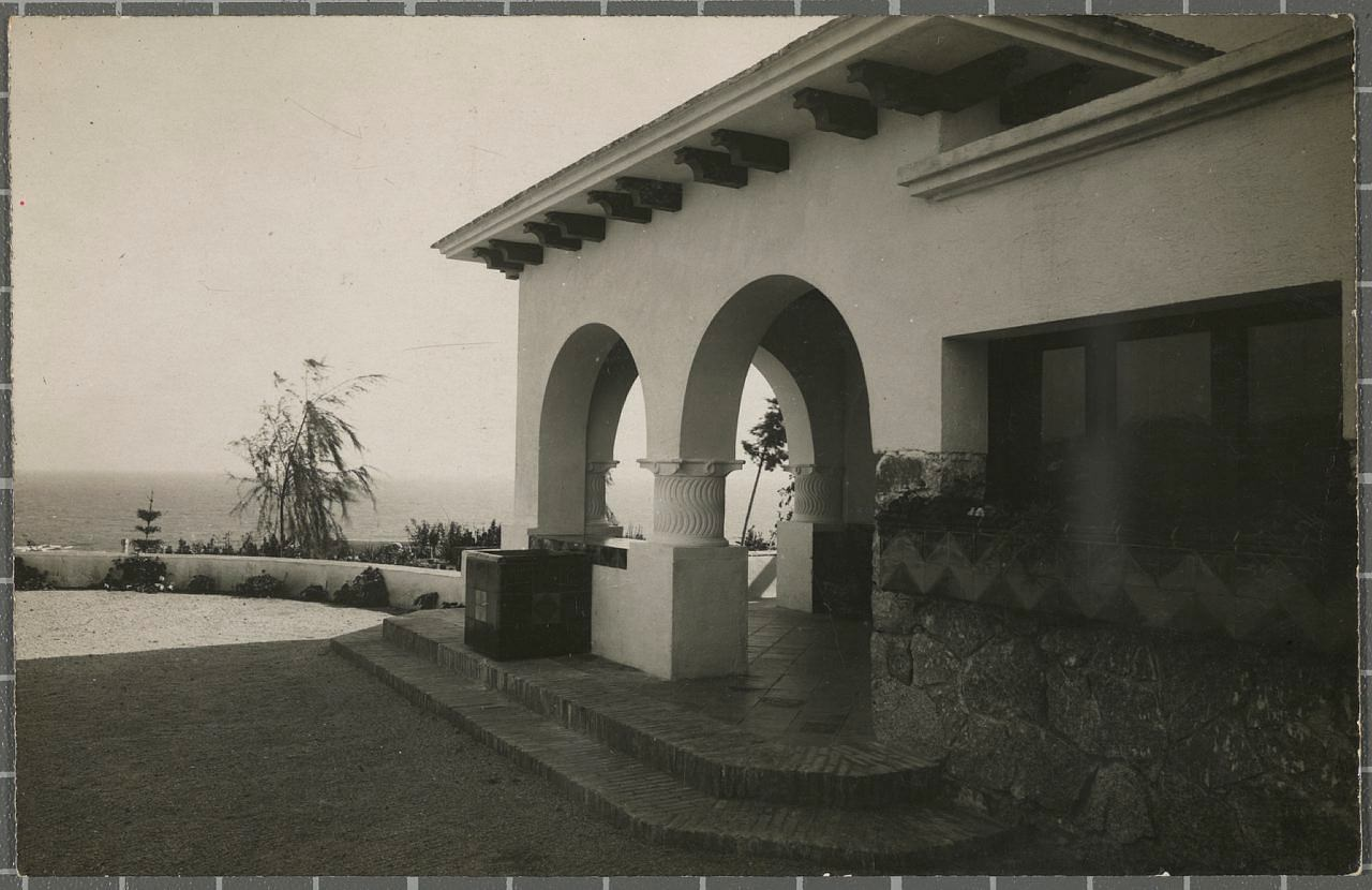 Porxo d'entra del xalet de la Senya Blanca (S'Agaró) obra de Rafael Masó i Valentí.